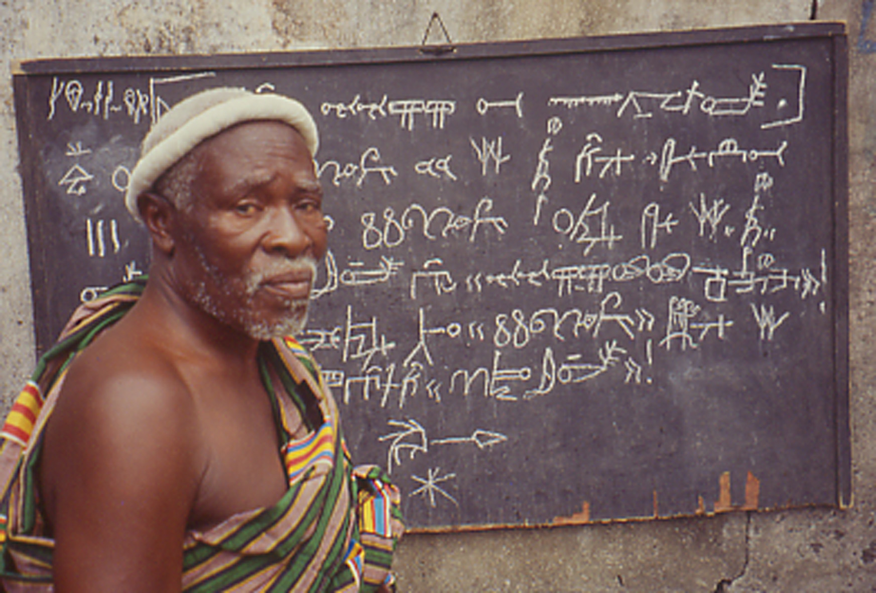 Ecriture Bété